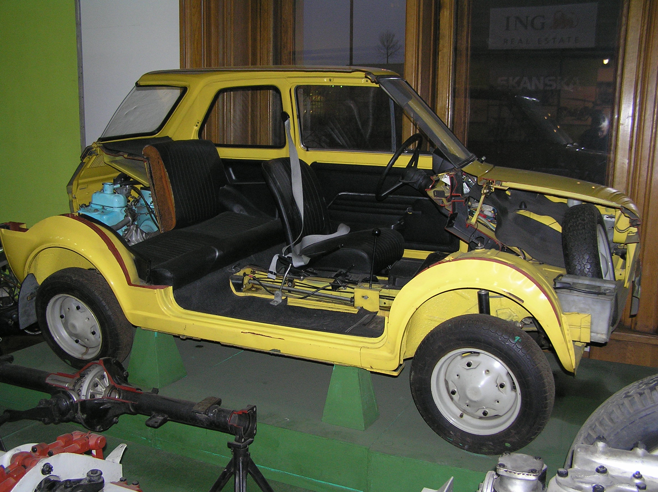 Przekrój przez samochód Fiat 126p, Muzeum Techniki Warszawa